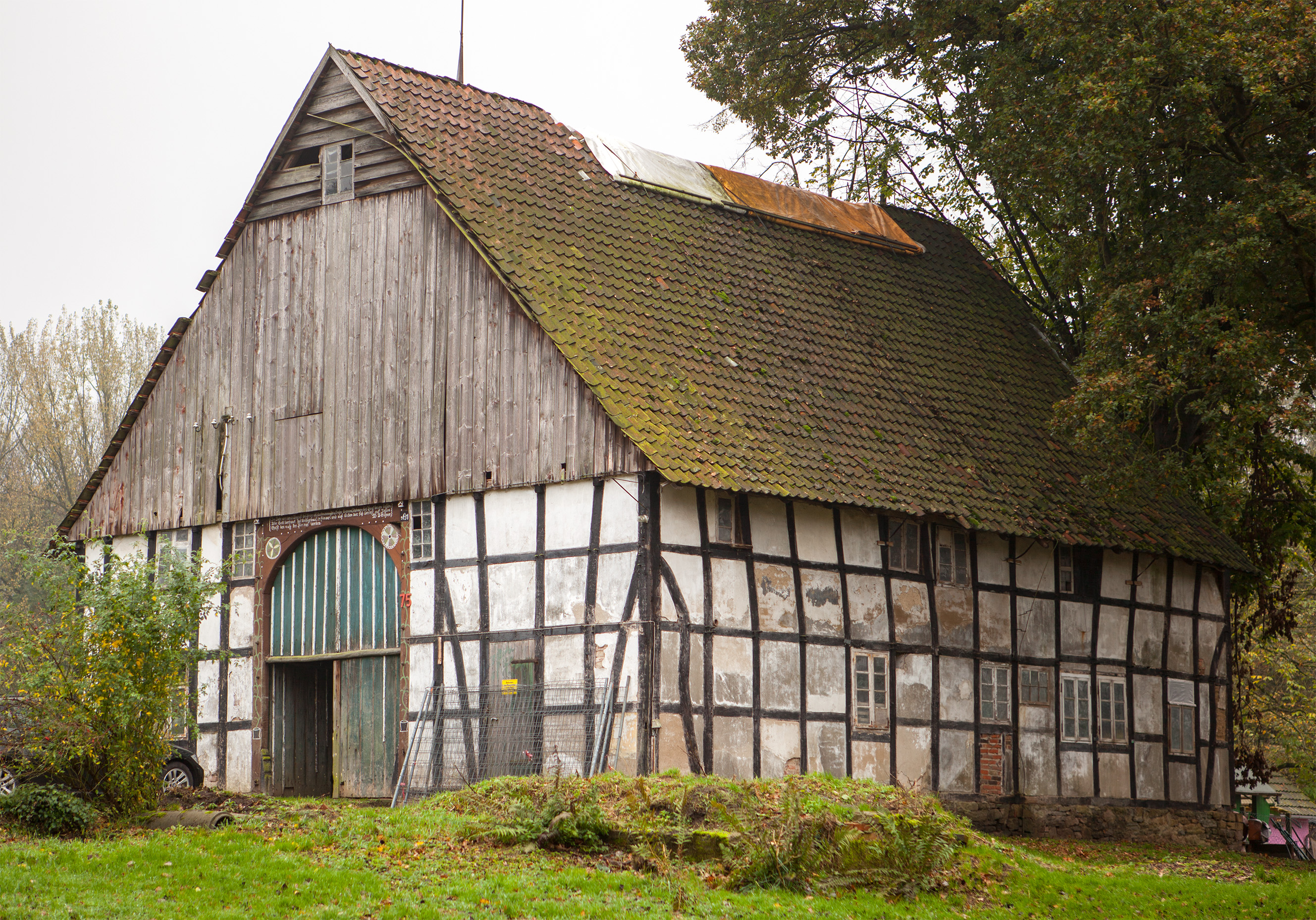 Wüsten (Bad Salzuflen), Auf der Heide 75 This is a photograph of an architectural monument.